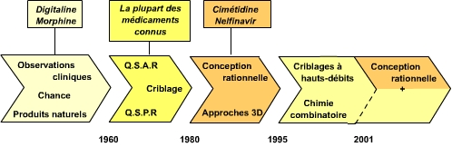 Histoire très succinte des approches usités en drug design